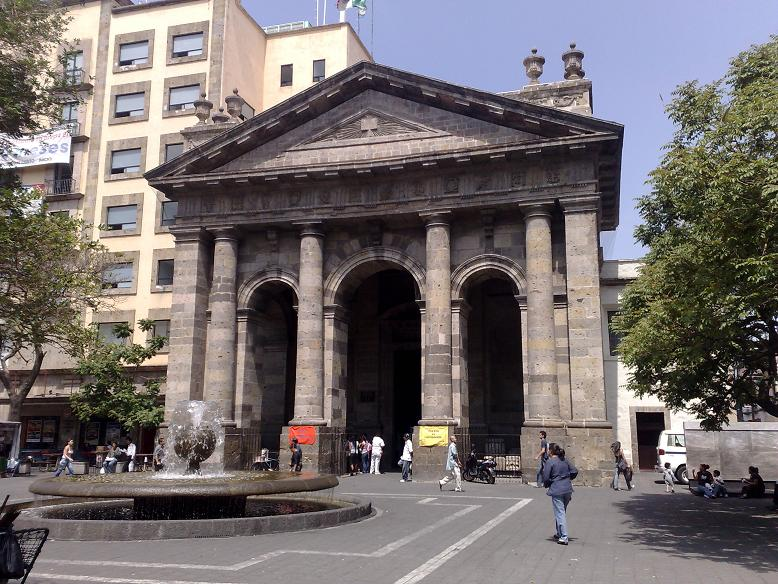 Biblioteca Iberoamericana